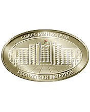 Эмблема Савета Міністраў Рэспублікі Беларусь